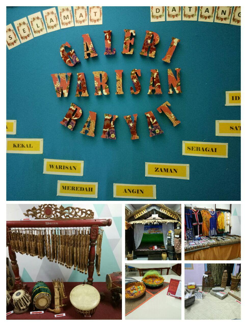 Galeri Warisan Rakyat turun temurun SMKBB